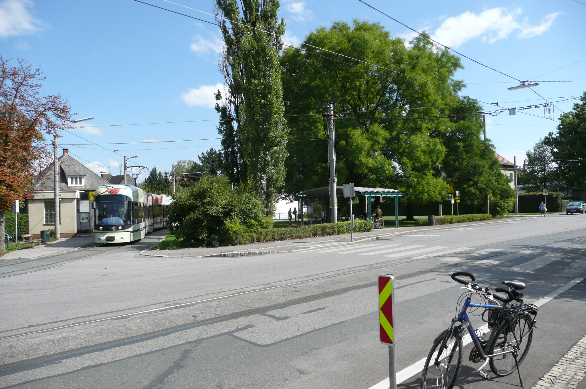 Endhaltestelle der Straßenbahnline 7 der GVB, Graz